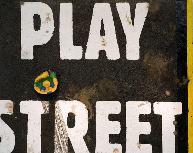 Asphalt Painting, Where do the children play? Michael Scheirl, 2006